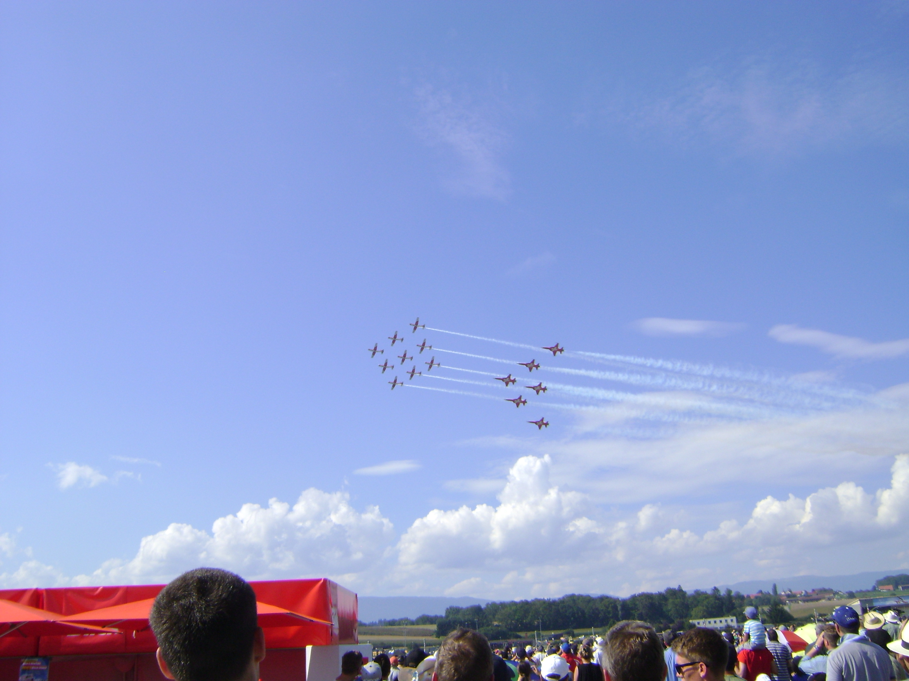 PSundPC7